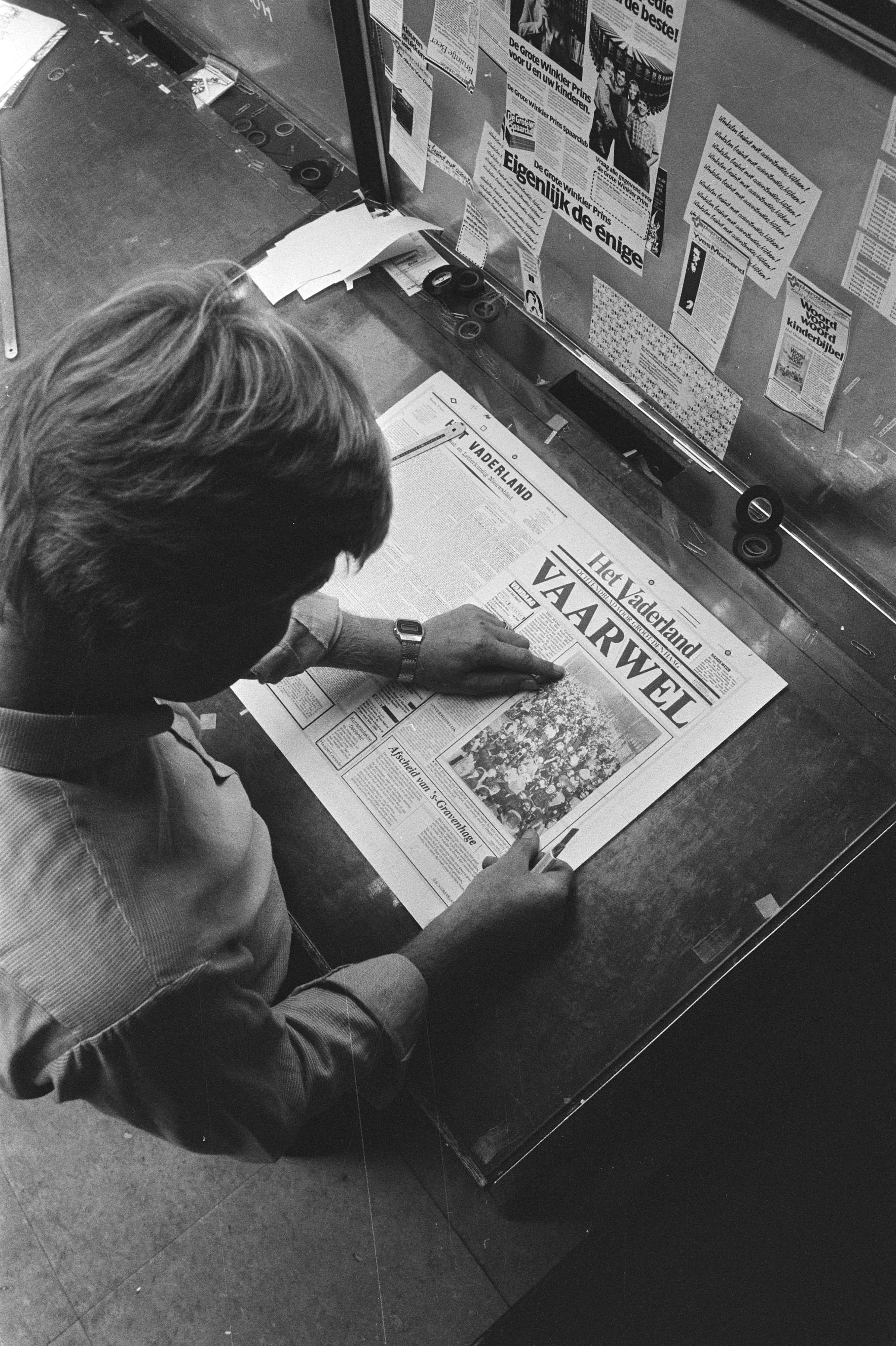 Collectie / Archief : Fotocollectie Anefo Reportage / Serie : [ onbekend ] Beschrijving : Laatste nummer van dagblad Het Vaderland wordt opgemaakt (is opgeheven) Datum : 13 augustus 1982 Trefwoorden : DAGBLADEN Instellingsnaam : Vaderland, Het Fotograaf : Bogaerts, Rob / Anefo Auteursrechthebbende : Nationaal Archief Materiaalsoort : Negatief (zwart/wit) Nummer archiefinventaris : bekijk toegang 2.24.01.05 Bestanddeelnummer : 932-2765